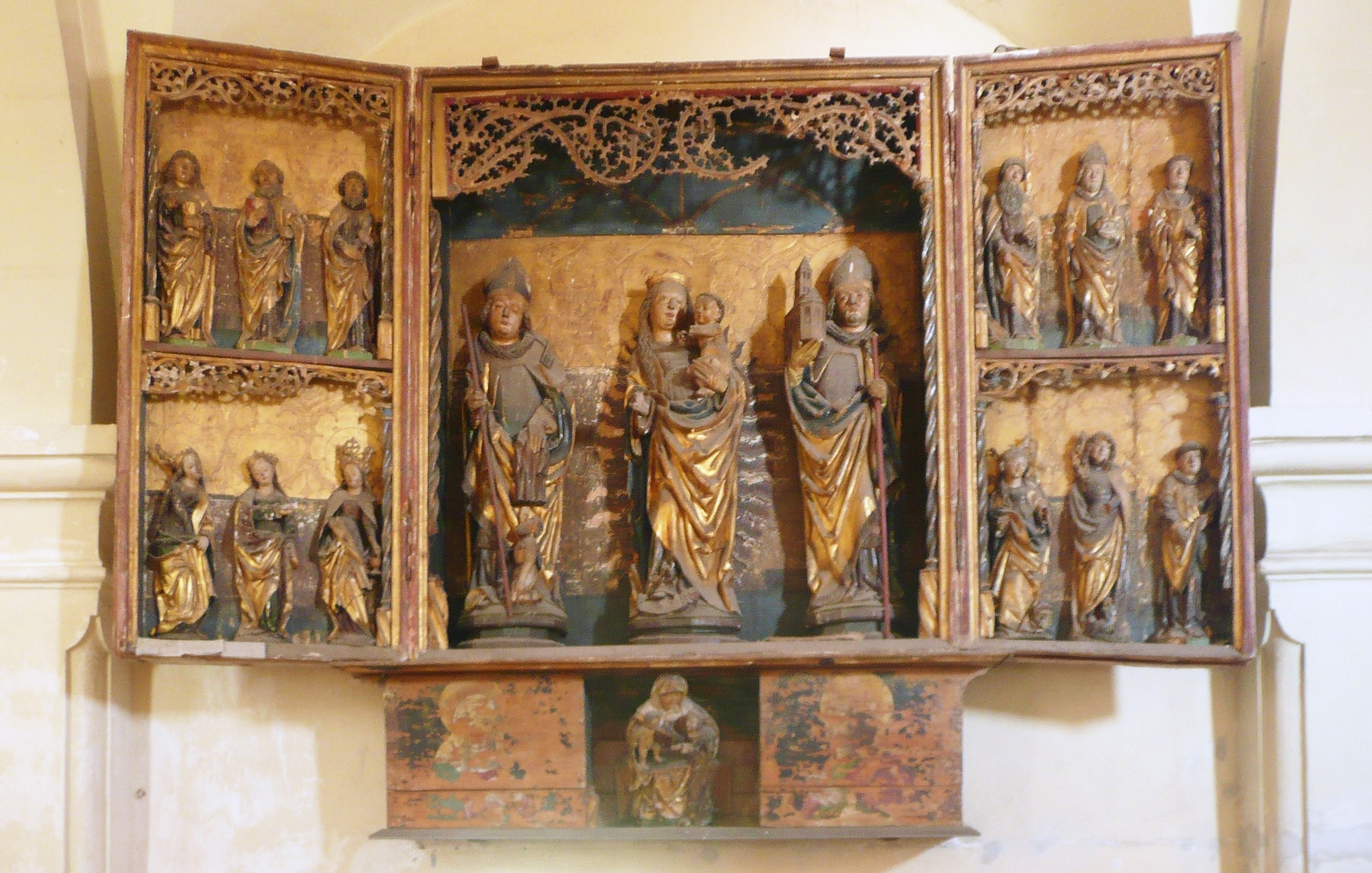 Altar „Beatae Mariae Virginis“ des ehemaligen Antoniterkloster Eicha bei Naunhof in Sachsen - heutiger Standort ist die Kirche in Albrechtshain